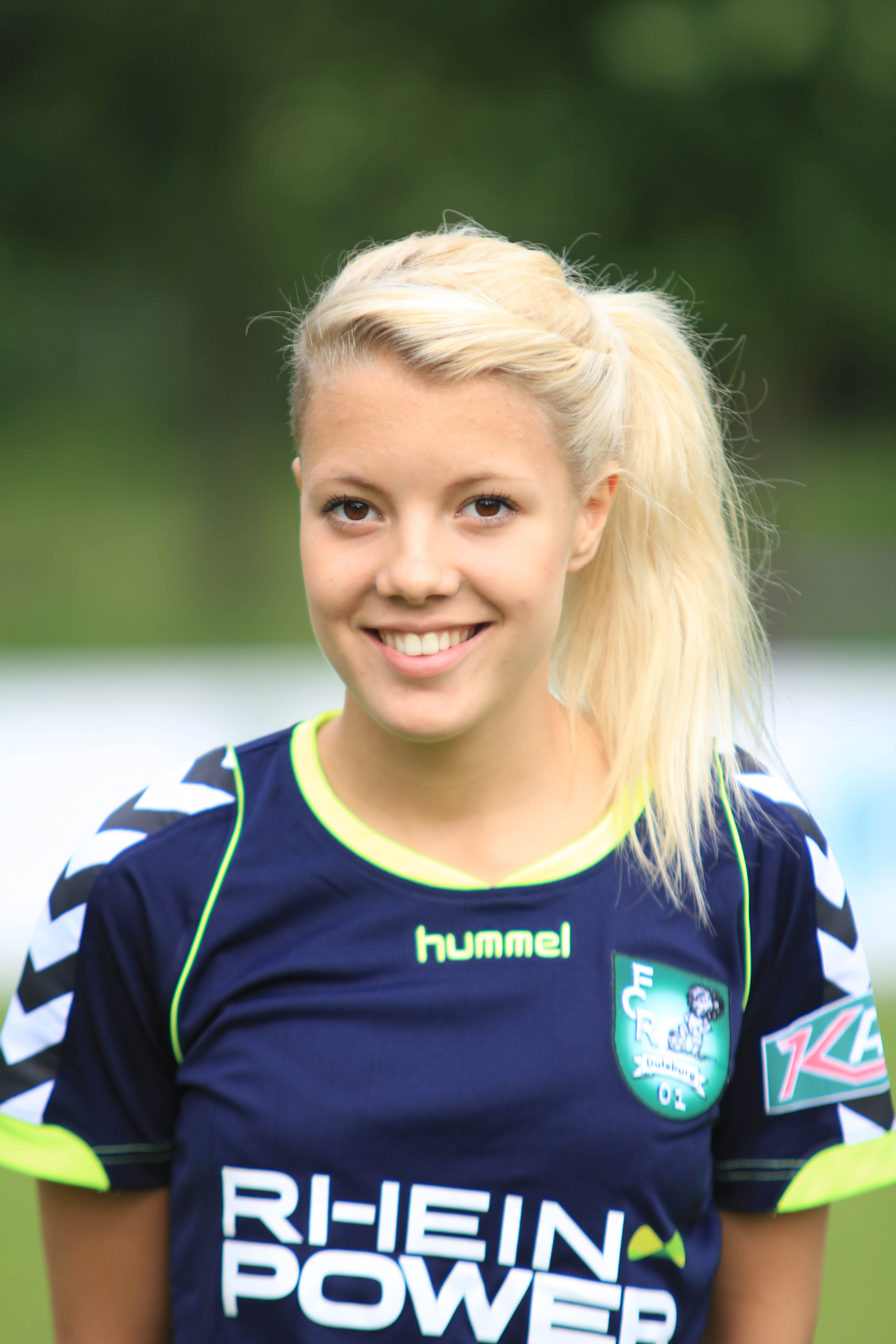 Vanessa Wahlen, FCR 2001 Duisburg